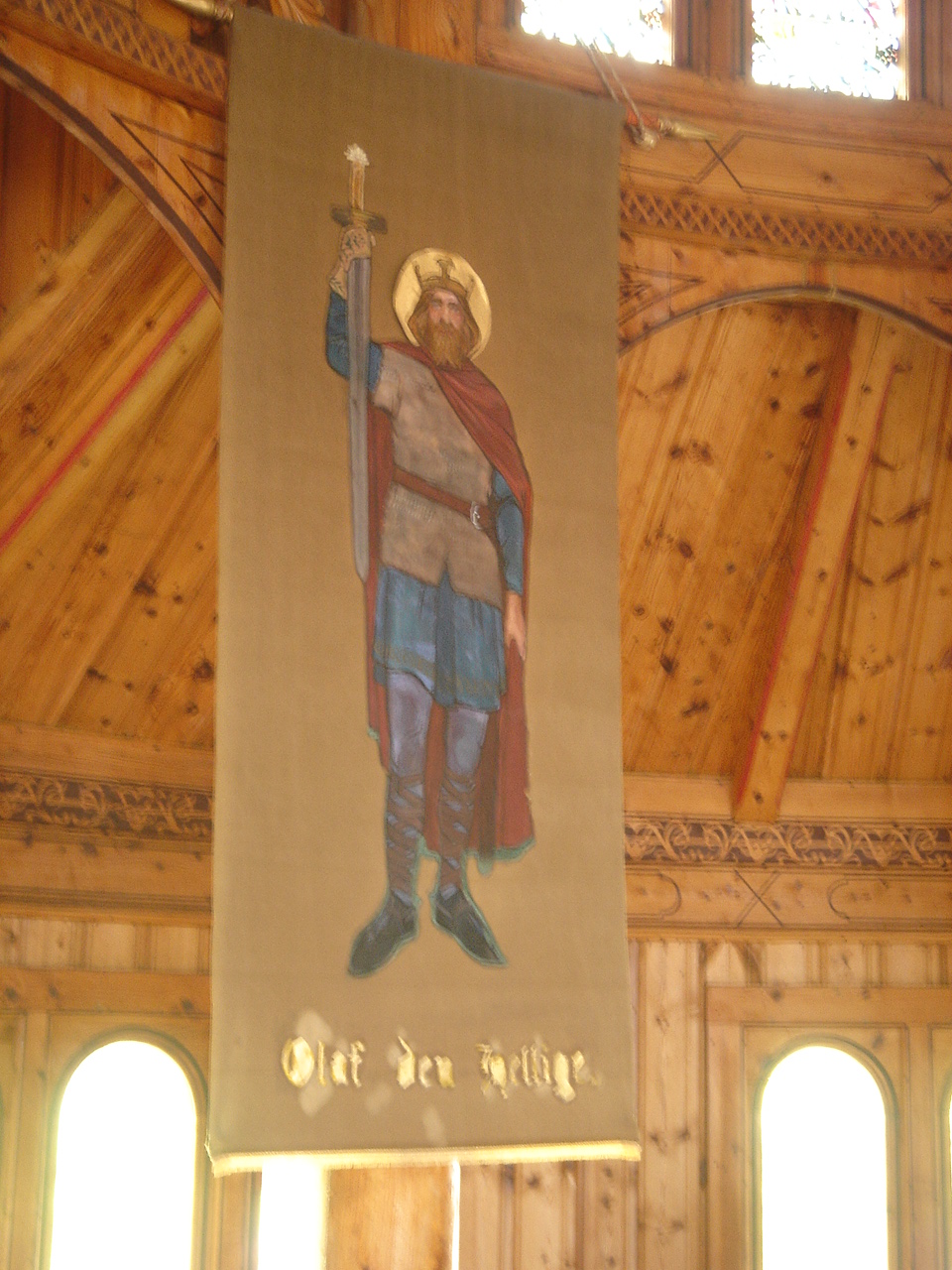 St. olafs church Balestrand, St.Olaf